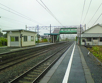 東日本旅客鉄道（JR東日本）東北本線：下田駅 ホーム 2007年5月27日 投稿者本人が1番線ホーム側より撮影 Category:鉄道駅ホーム画像 Category:東日本旅客鉄道の画像 Category:おいらせ町の画像